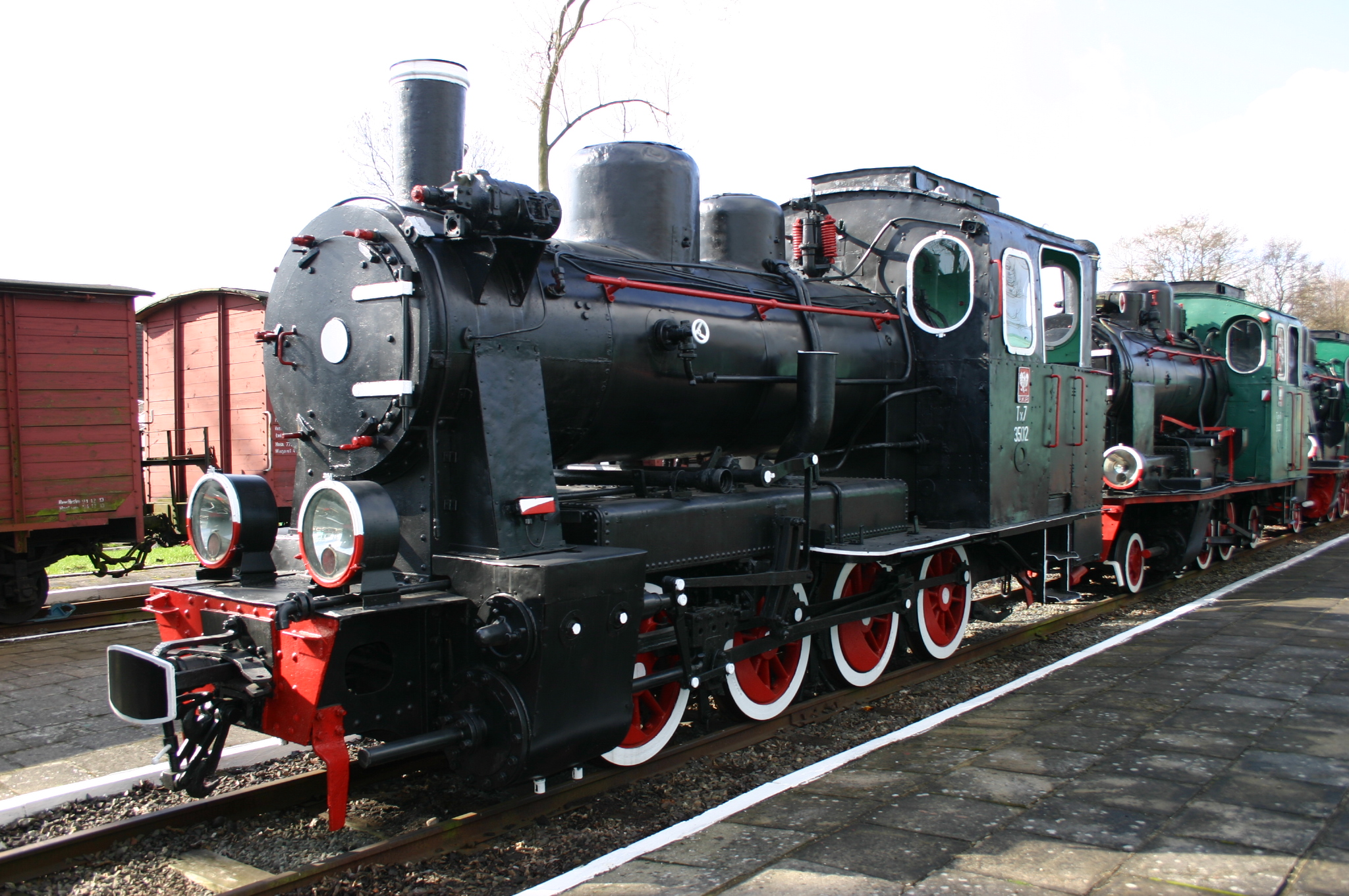 Dampflok Tx 7-3502 im Eisenbahnmuseum Gryfice 19.04.06